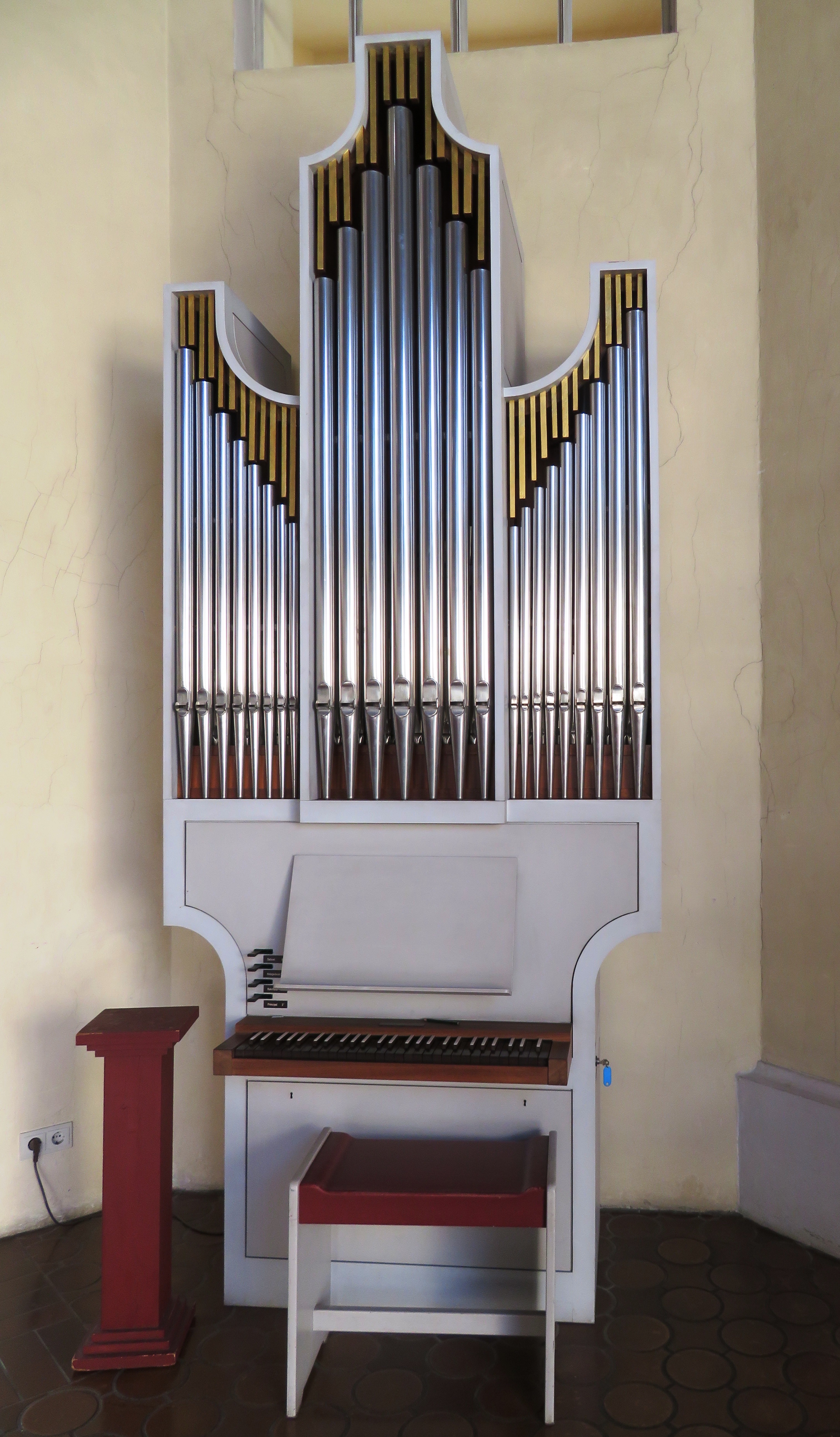 Orgelpositiv der evang.-luth. Himmelfahrtskirche München-Pasing, erbaut 1984 von Orgelbau Klais, Bonn (Opus 1632)